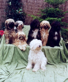 Tibetan Terriers de Khyi-Lha